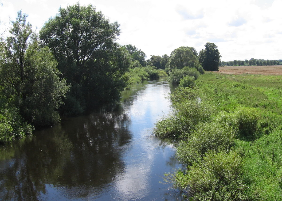 Rzeka Rega z mostu kolejowego pod wsią Nowielice, zachodniopomorskie